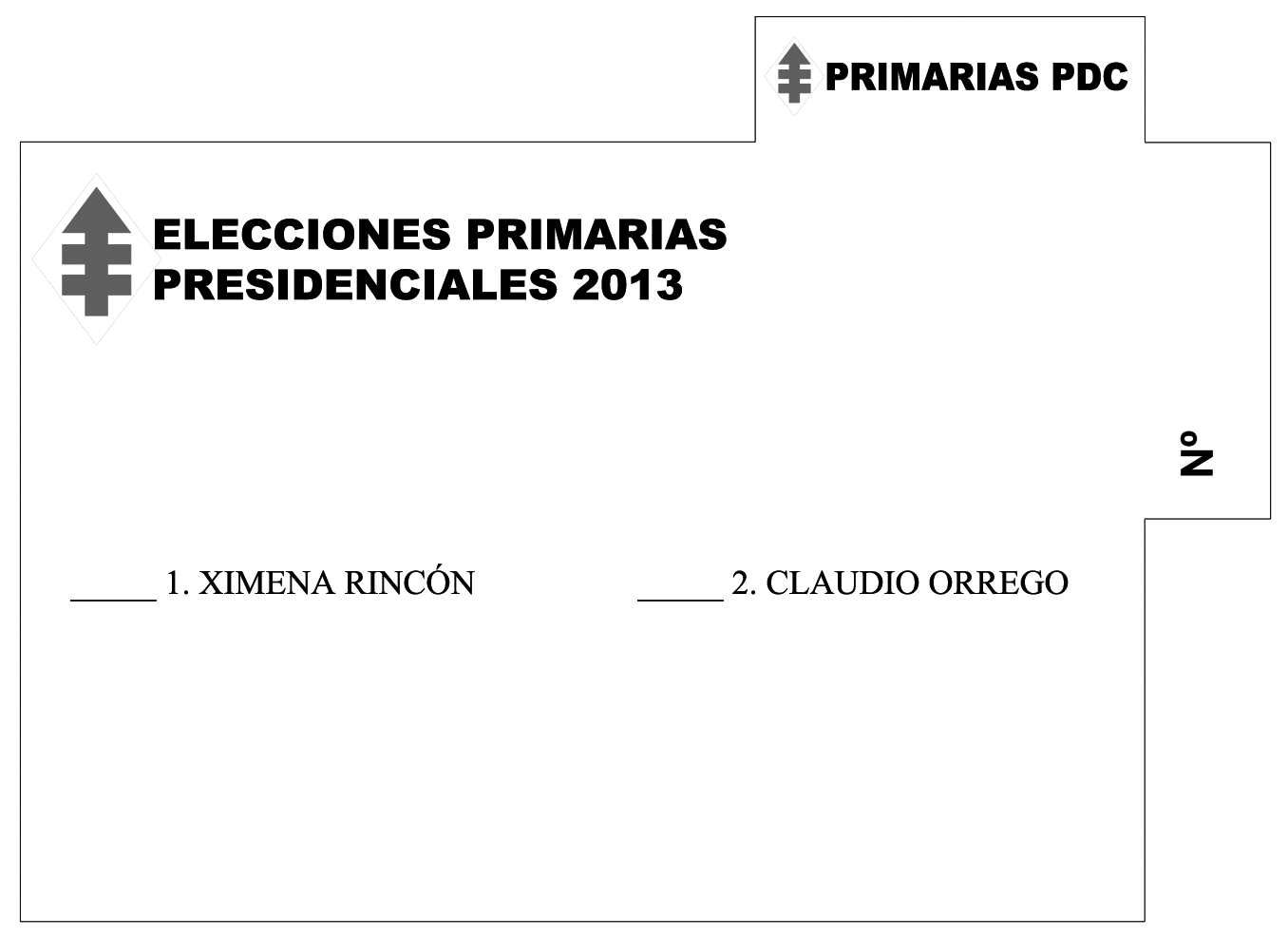 Reproducción del voto utilizado en las primarias presidenciales del Partido Demócrata Cristiano de Chile en 2013.